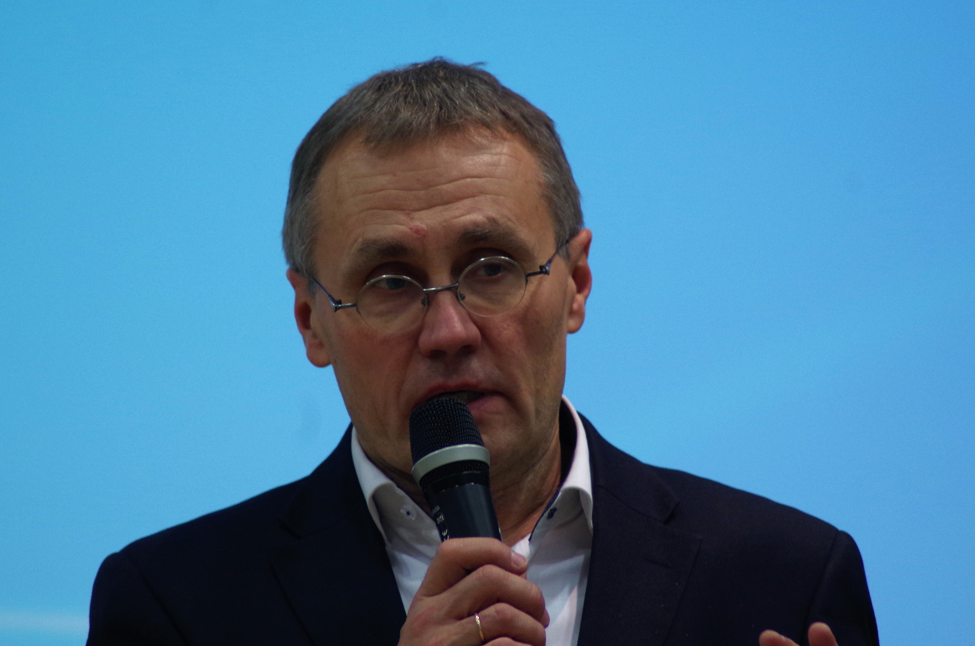 Tõnis Lukas Keelefoorumil 2018